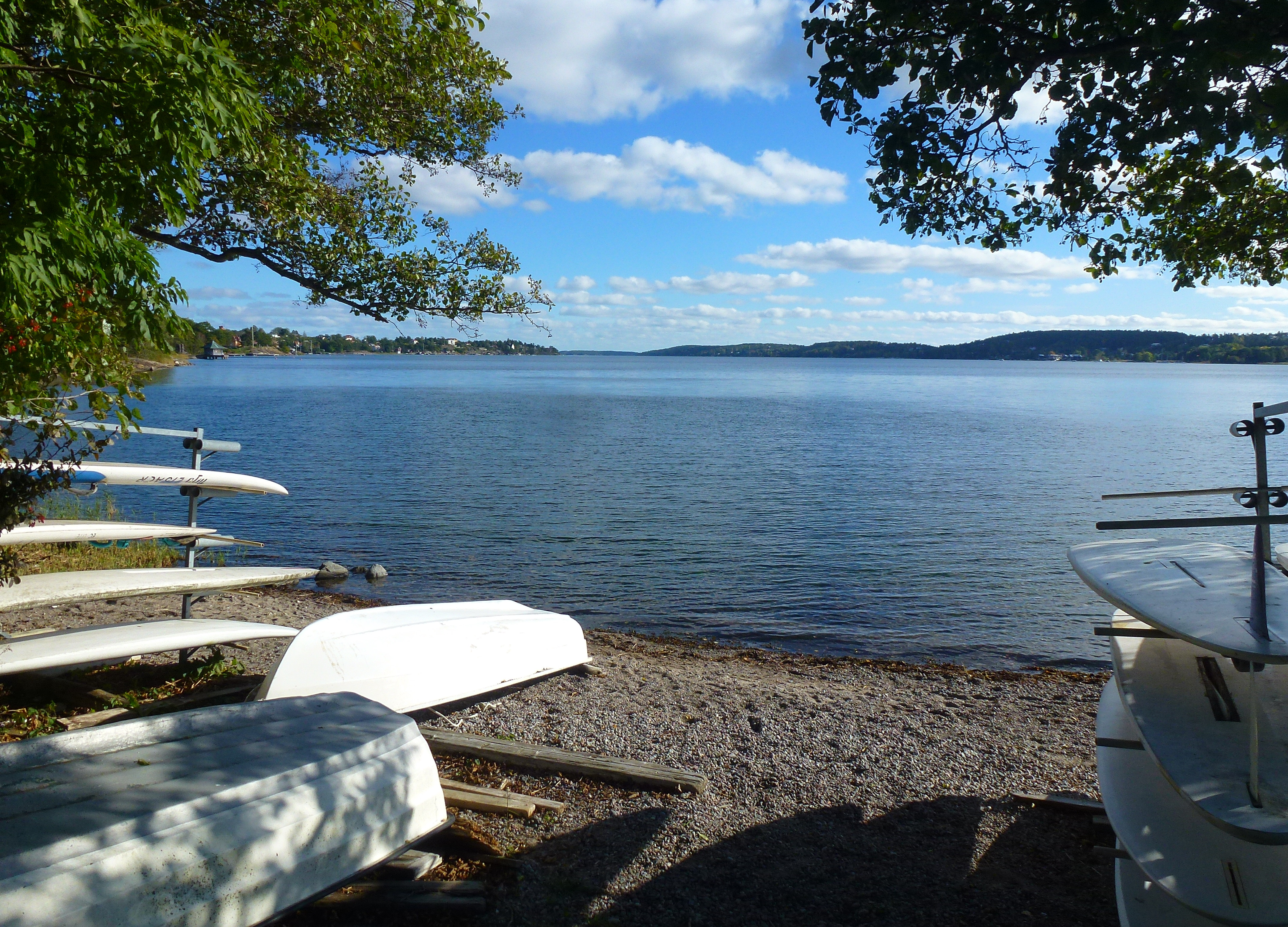 Erstaviken sedd mot sydost